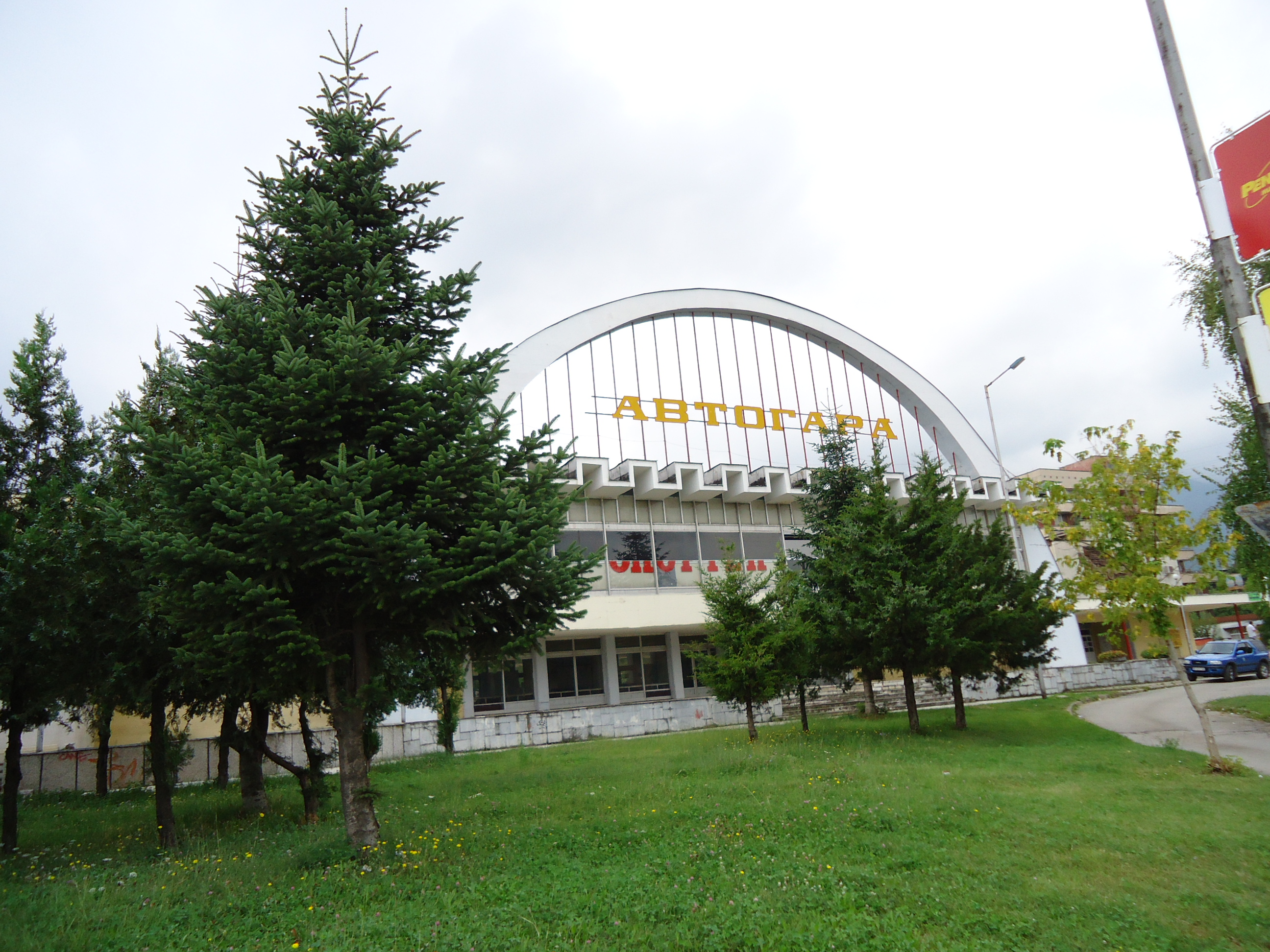 Автогара "Враца"